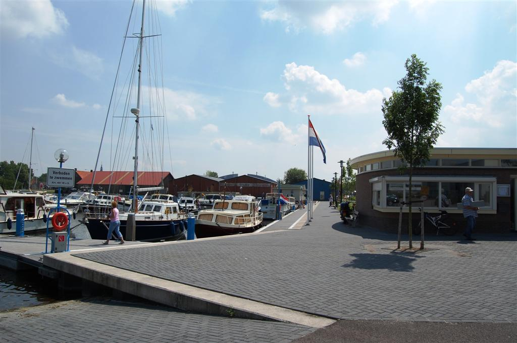 De Gemeentelijke Jachthaven in Schagen aan het einde van de Industriehaven